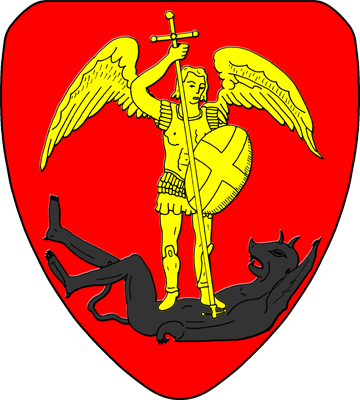 Armoiries de la commune de Bruxelles, blasonné de gueules au Saint Michel d'or terrassant le démon de sable